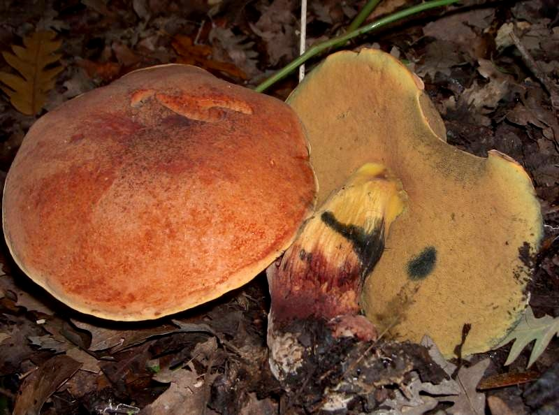 Boletus queletii - Lajatico (PI), Italy - Nov. 2004 - B.Baldassari, foto personale